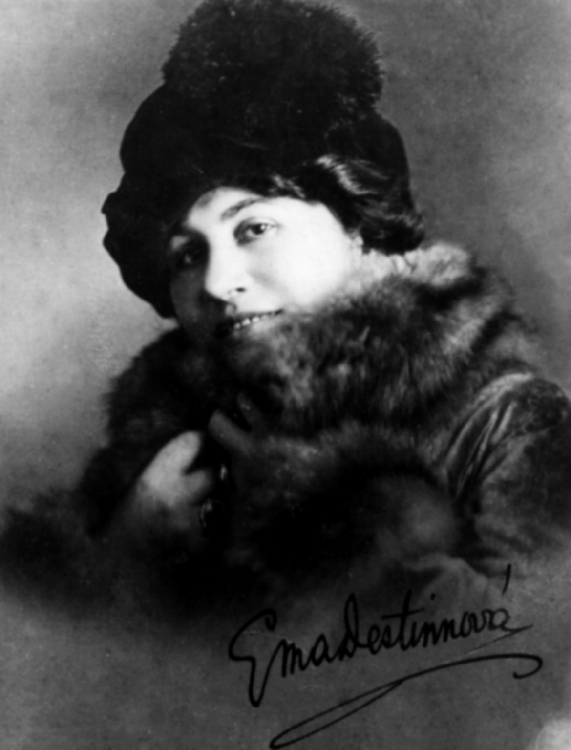 Ema